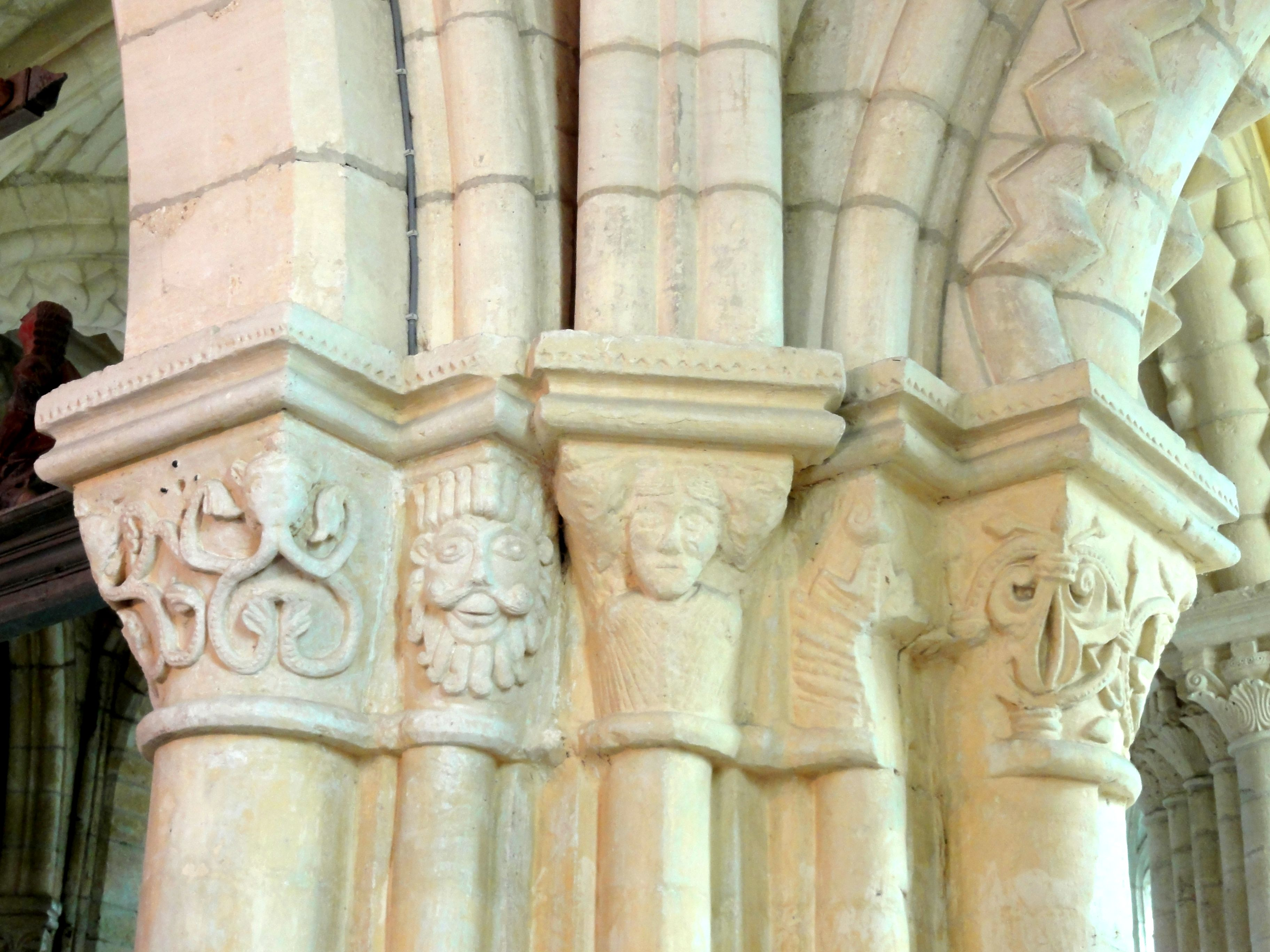 Bas-côté sud, 2e travée, chapiteaux dans l'angle nord-est (pile SO de la croisée).